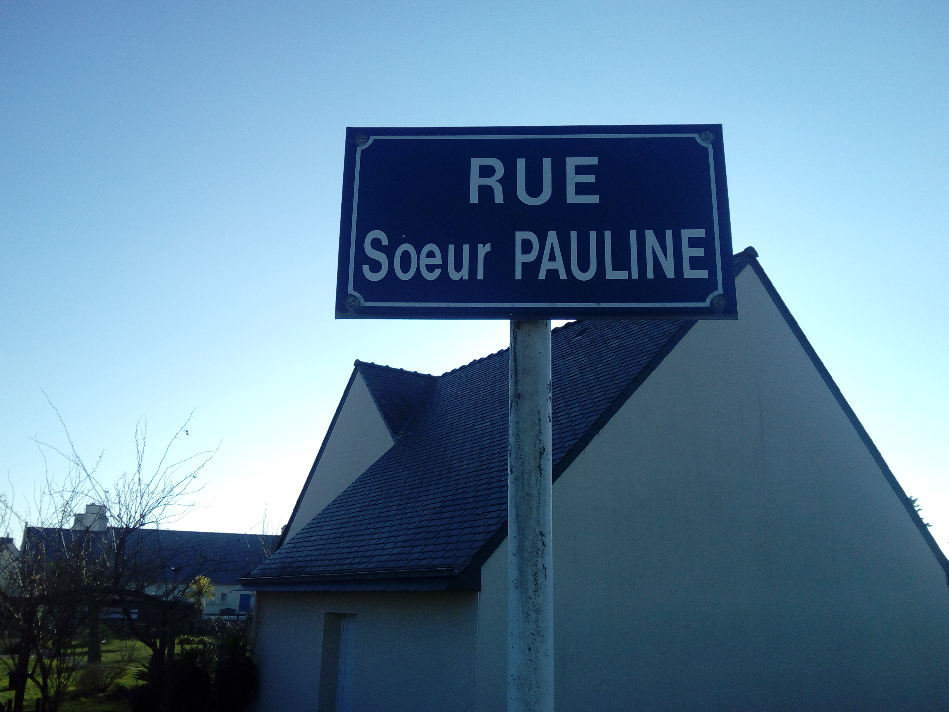 Plaque de la rue soeur Pauline Guilvinec